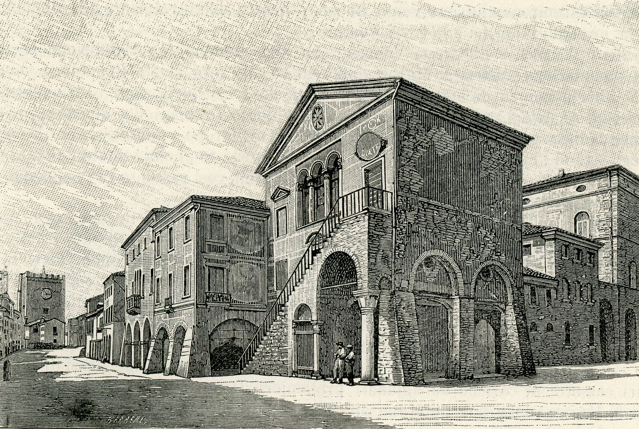 Mestre: antica Provvederia e Borgo Palazzo (xilografia).